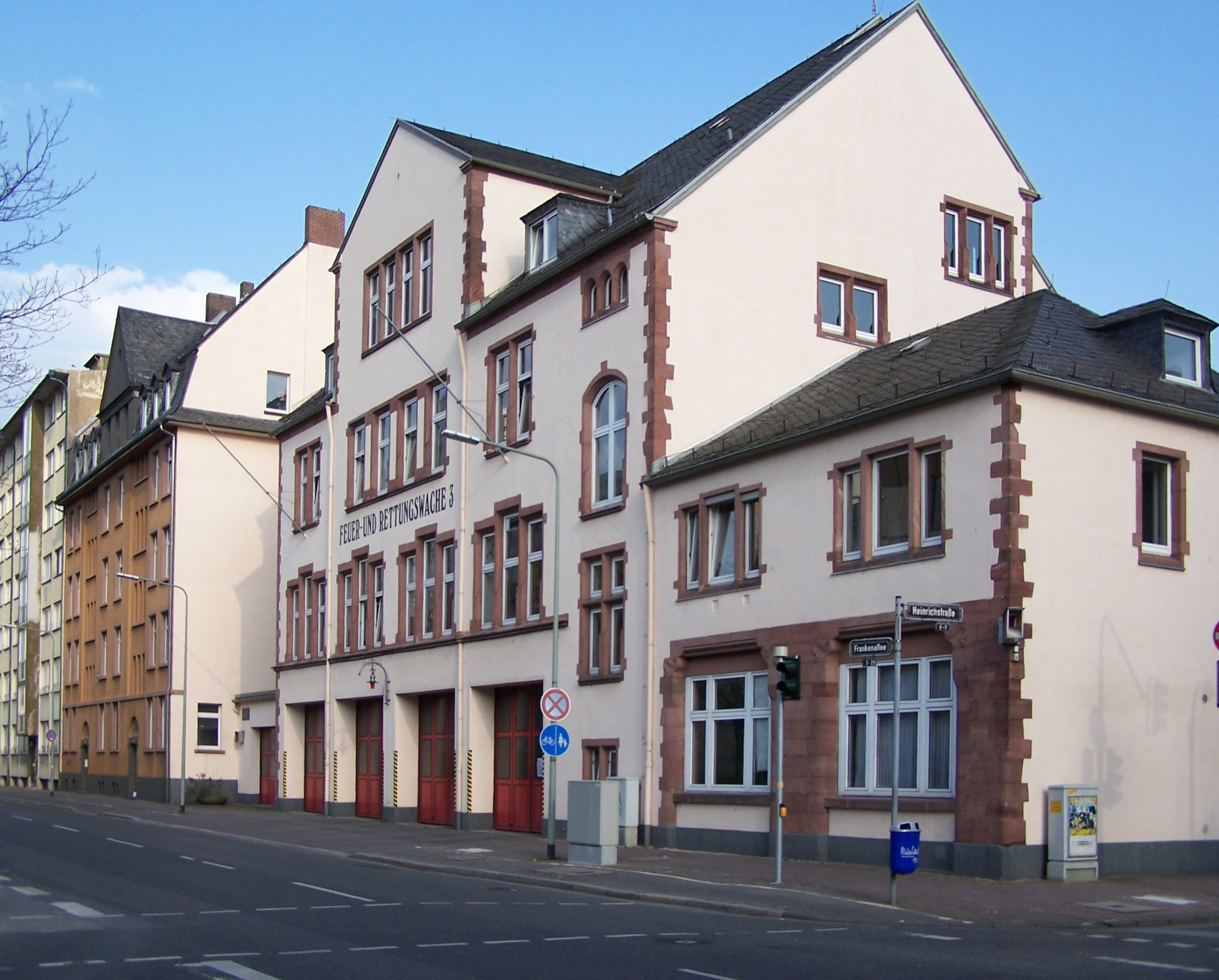 Bereichsleitungswache 2, Nordseite